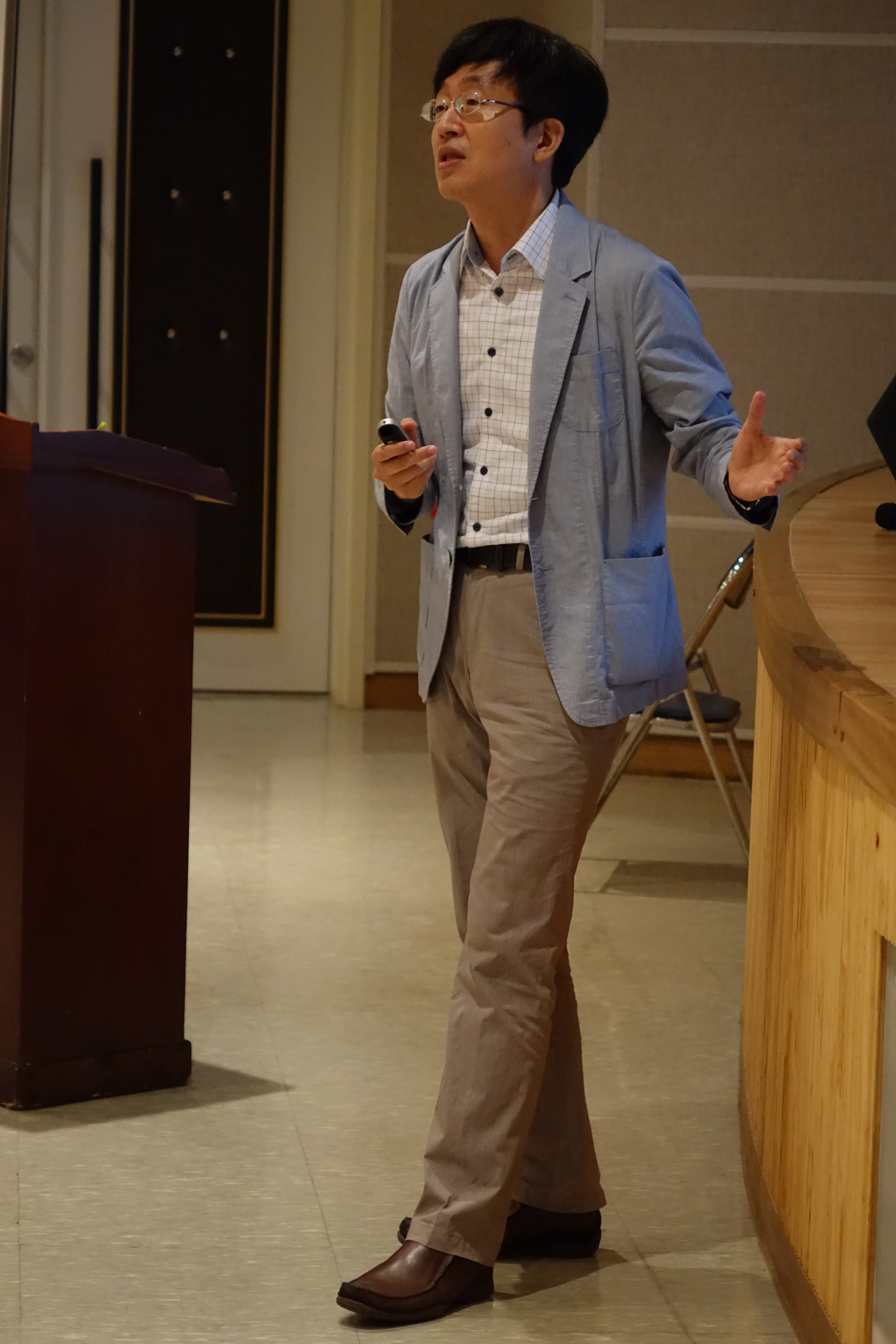 박재성, 2015년 7월 서울특별시 동작구 보라매안전체험관 시민안전파수꾼 안전교육강사 교육과정